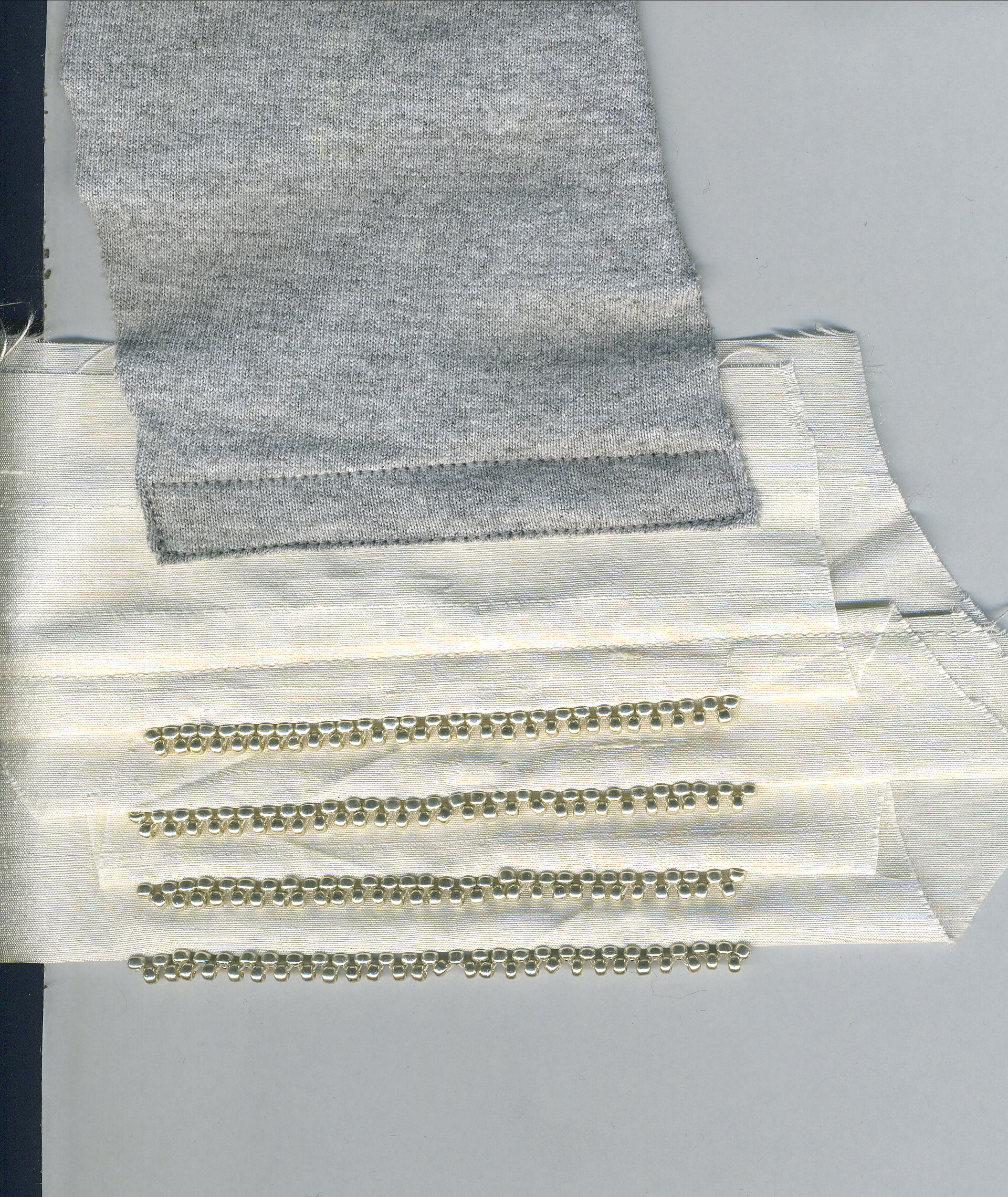 Klädesplagg i shantung.